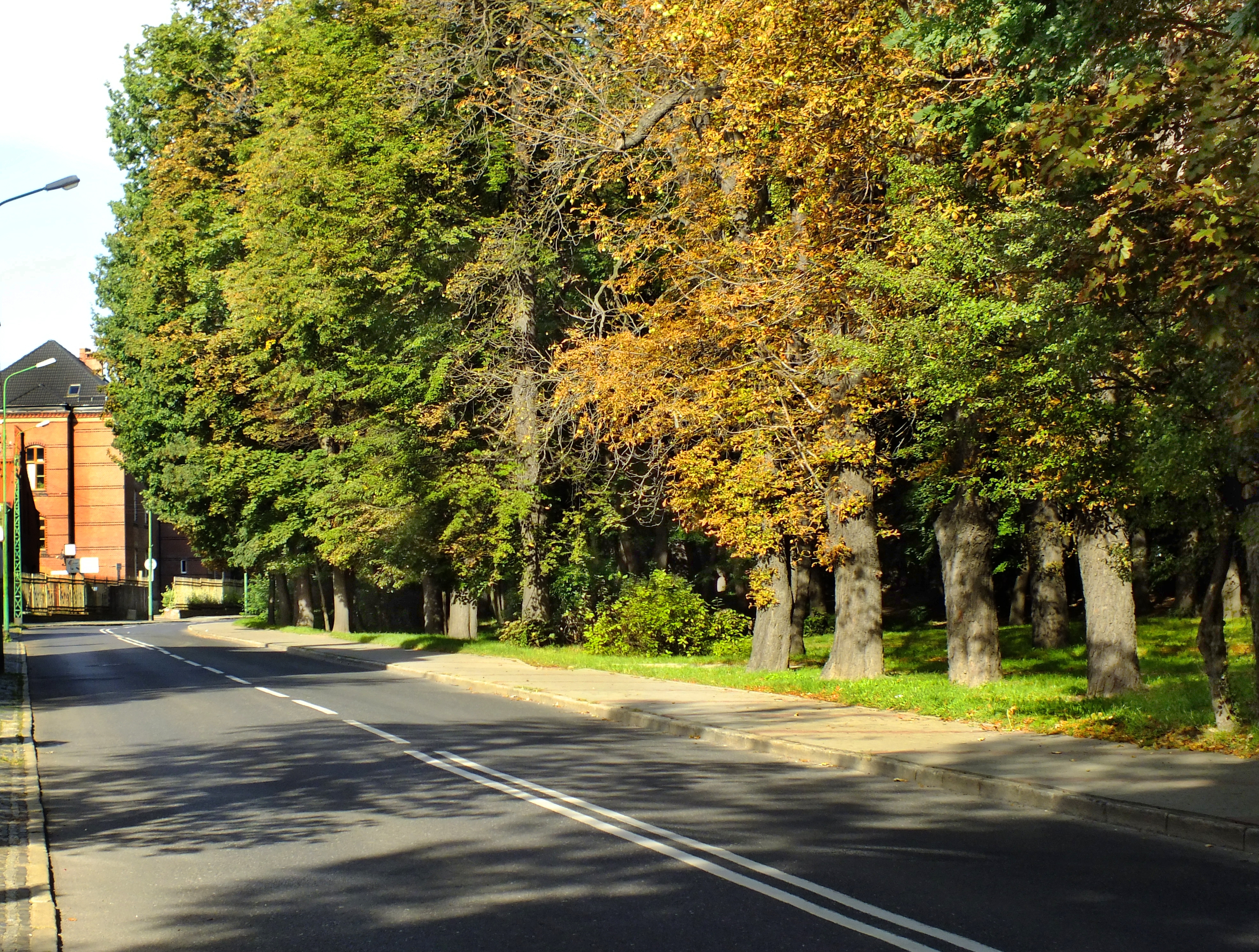 Świdnica - park miejski tzw. "Młodzieżowy", widok od Armii Krajowej